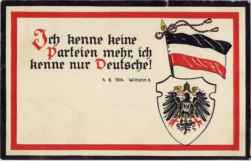 Postkarte an Mathilde Oeckermann aus Gr. Mackenstedt von ihrer Cousine Tine aus Bremen. Diese Postkarte mit dem bekannten Zitat von Wilhelm II. wurde während des 1. Weltkrieges auch im alltäglichen Zivilpostverkehr verwendet.